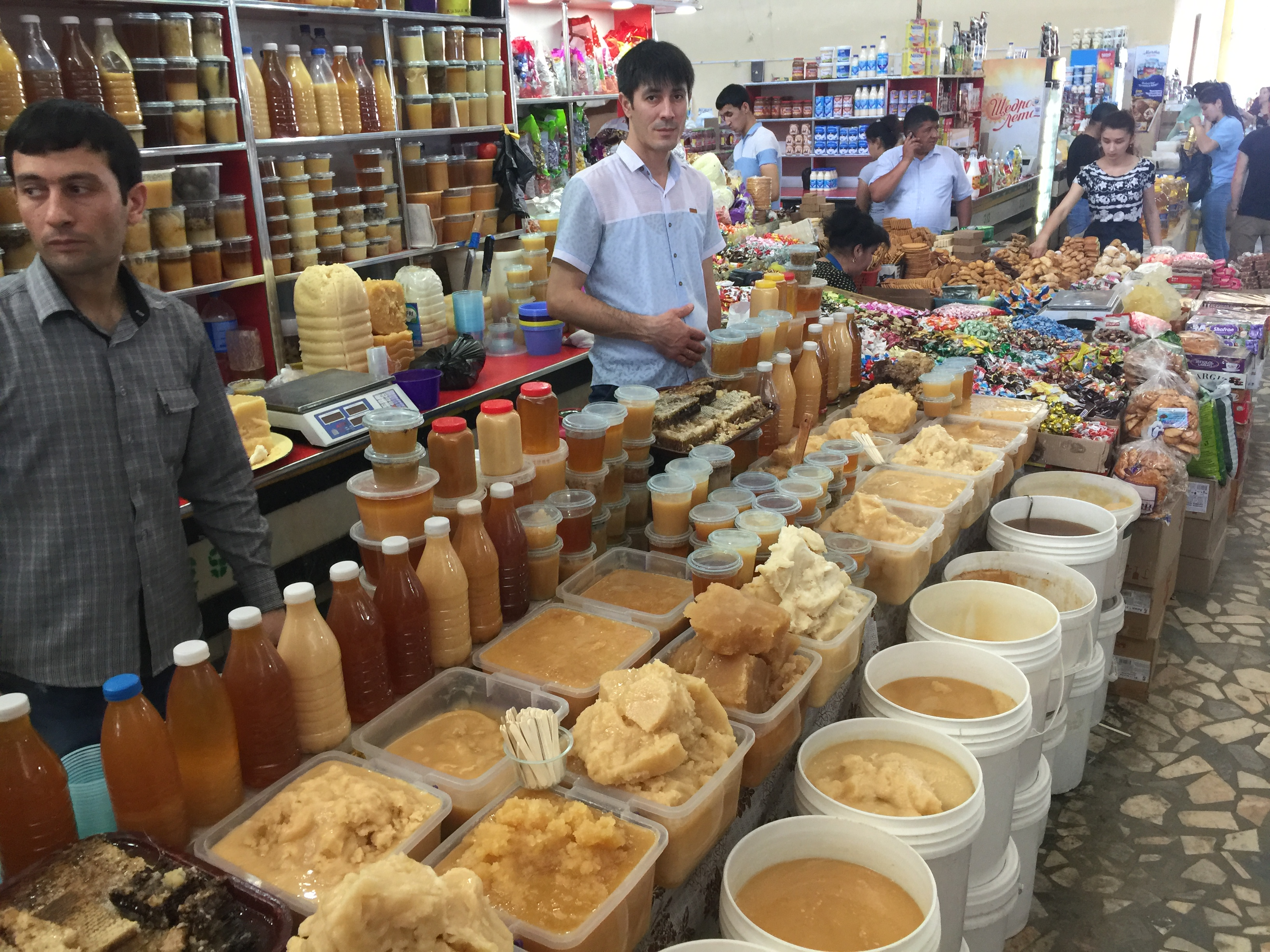 Honighändler in einer der zentralen Markthallen in Urgench